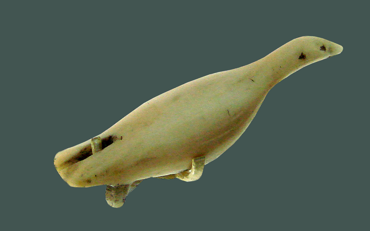 Mammifère marin Culture du Dorset (Musée du quai Branly) Exposition Upside down, Les Arctiques Musée du quai Branly